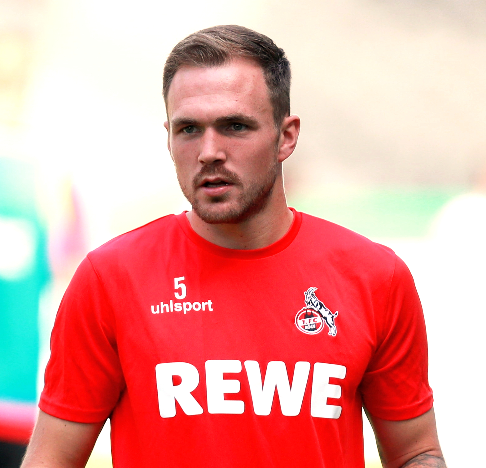 DFB-Pokal 2018/19, 1. Hauptrunde: BFC Dynamo gegen 1. FC Köln 1:9 (1:4)